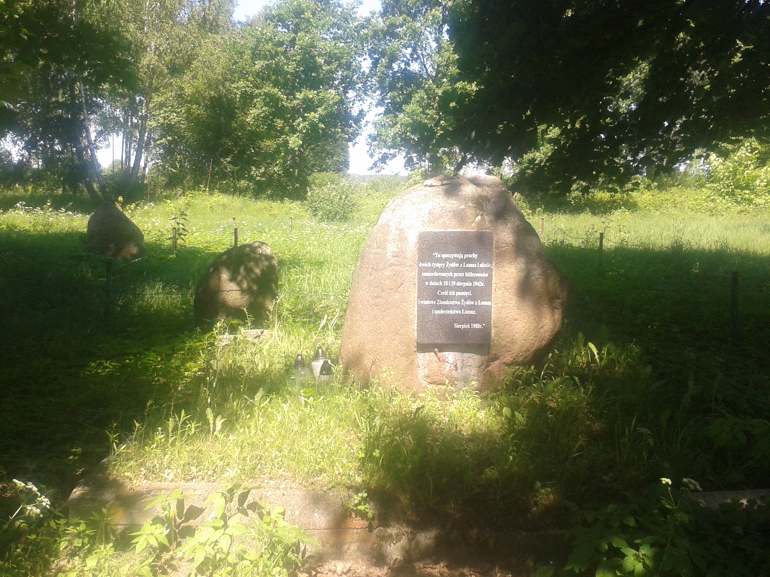 Pomnik upamiętniający martyrologię Żydów z Łomaz